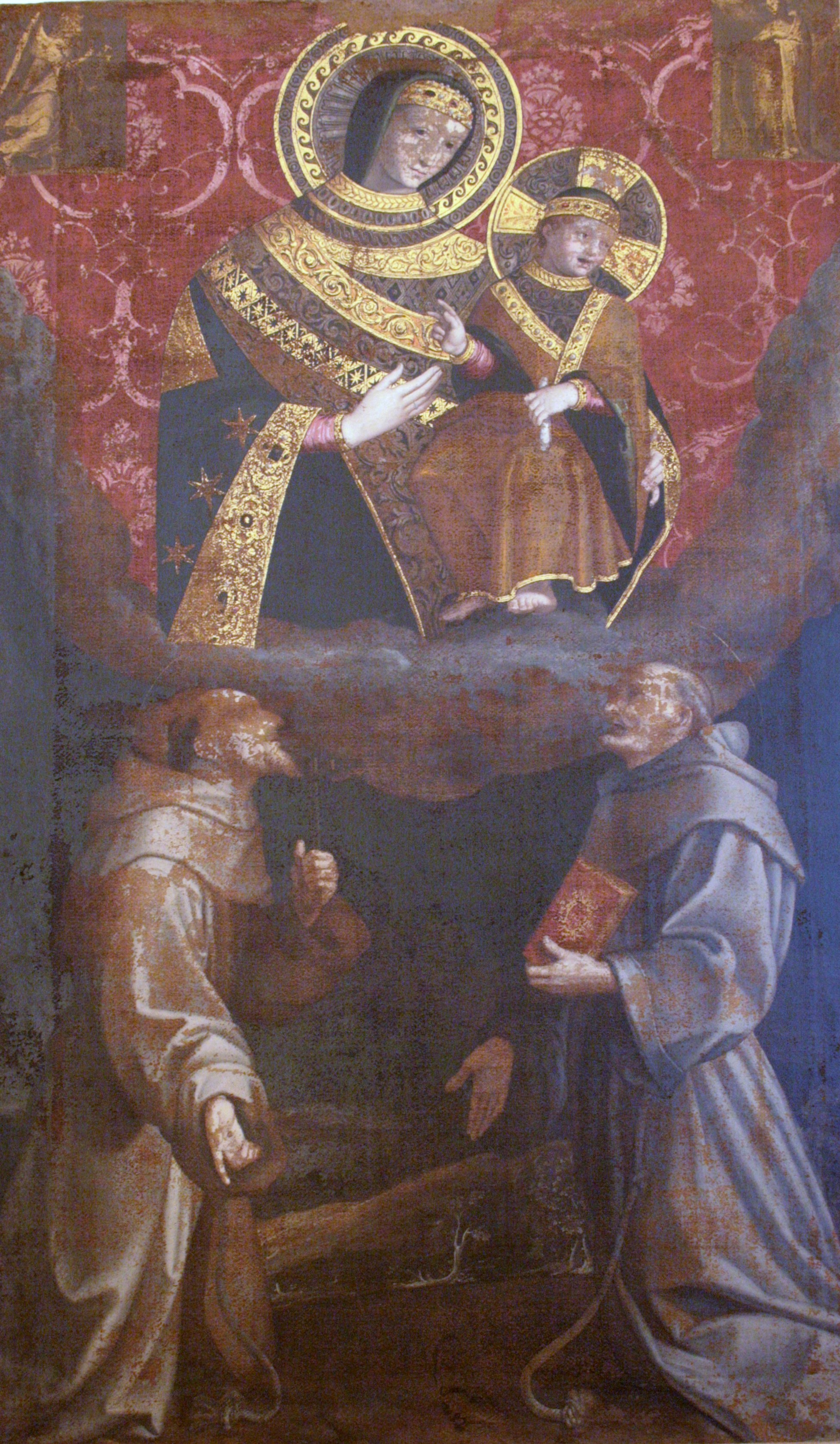 Madonna di Costantinopoli di Ascensidonio Spacca detto il Fantino conservata nel Museo civico di Bevagna (PG)